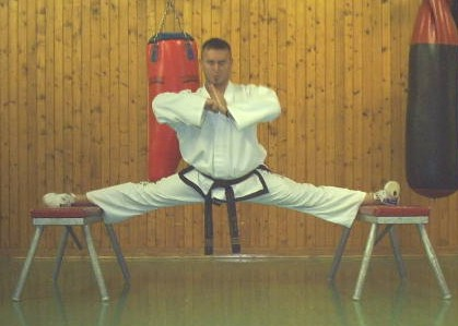 Spagat Dalibor Medic